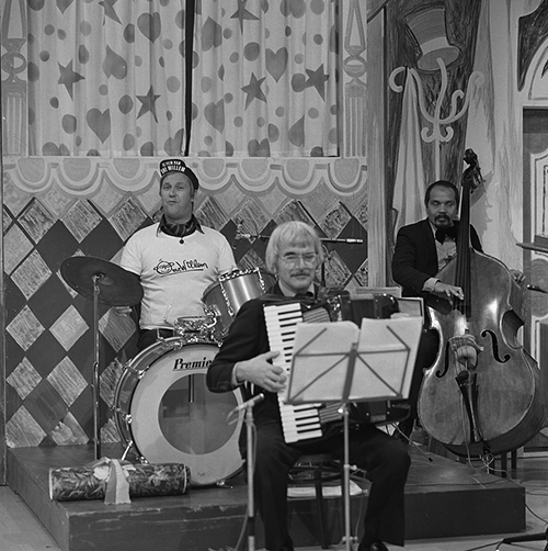 Edwin Rutten, Harry Mooten en Frank Noya in de Nederlandse kinderserie De film van Ome Willem in 1981